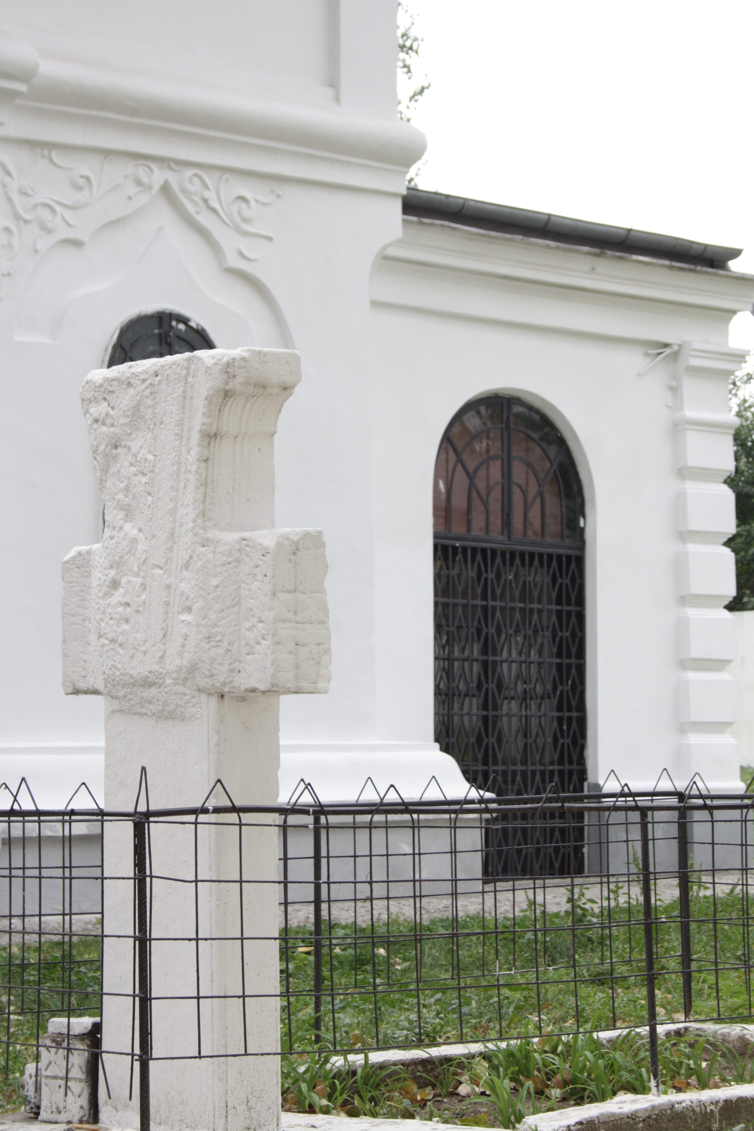 Cruce de piatră, Str. Budișteanu C-tin g-ral 4-6 sector 1 în curtea bisericii Manea Brutaru vedere din spate